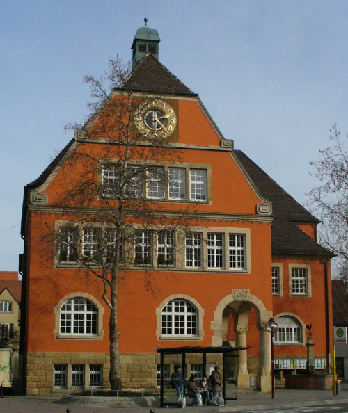 Stuttgart-Vaihingen, Rathaus; erbaut 1906/1907 nach Entwurf der Stuttgarter Architekten Ludwig Eisenlohr (sen.) und Carl Weigle; Putzbau in barockisierender Reformarchitektur